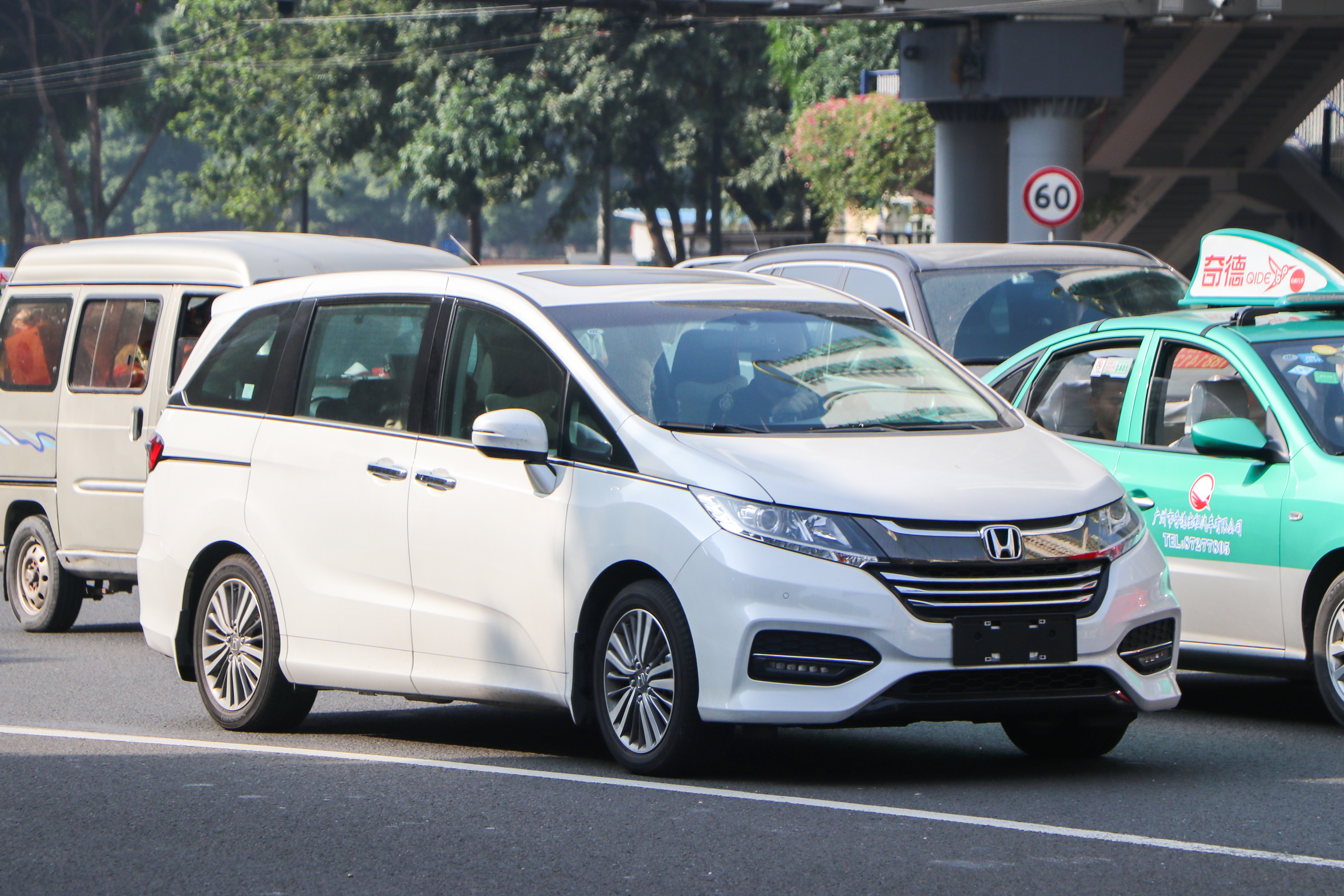 广汽本田奥德赛